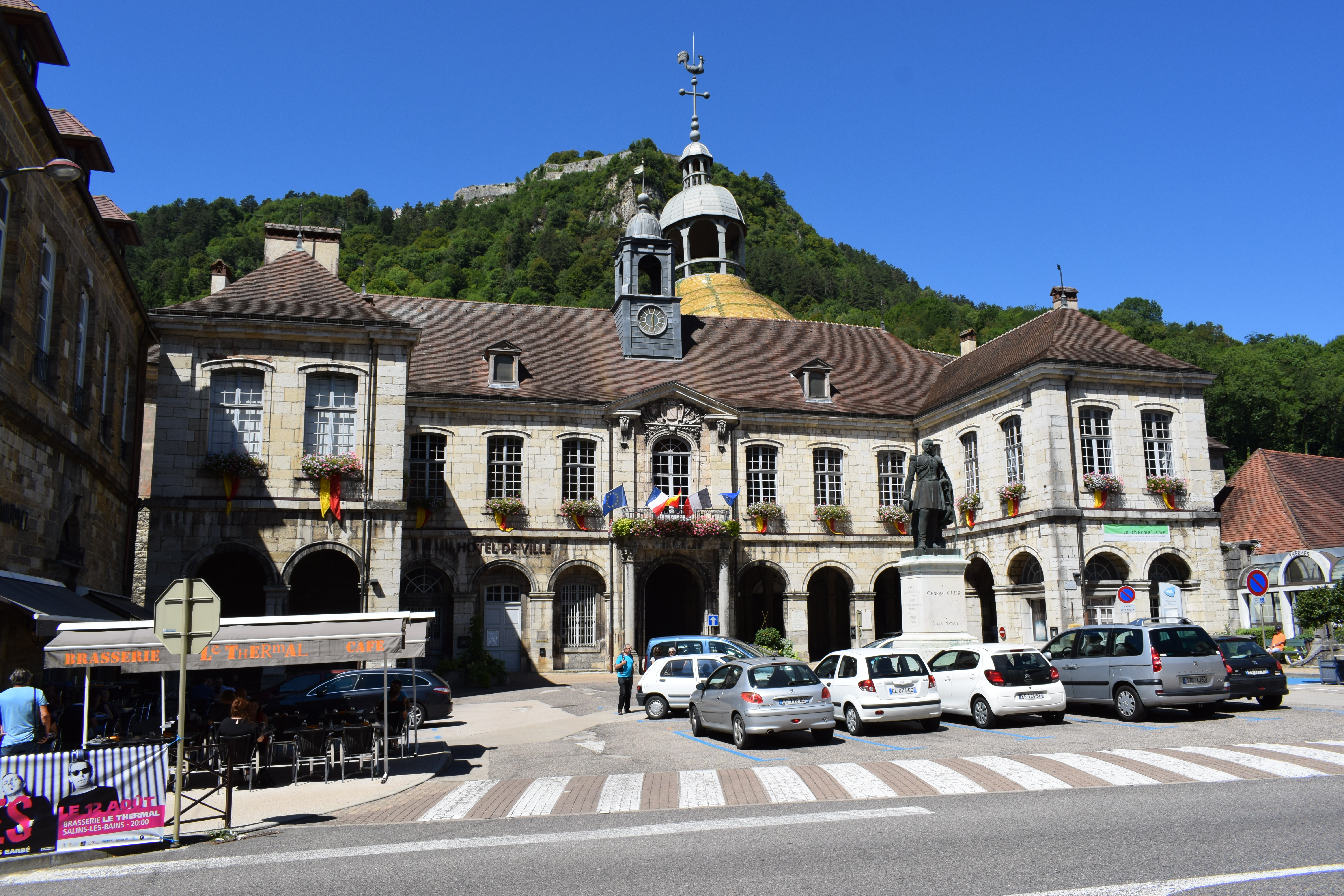 Vue de Salins-les-Bains, dans le département du Jura (Franche-Comté, en France).